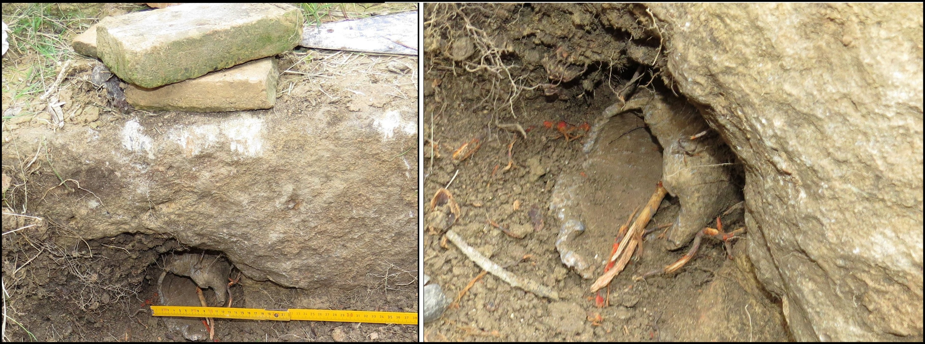 Lespignan, Occitanie : villa romaine de Vivios. Tuyau en plomb de la grande piscine